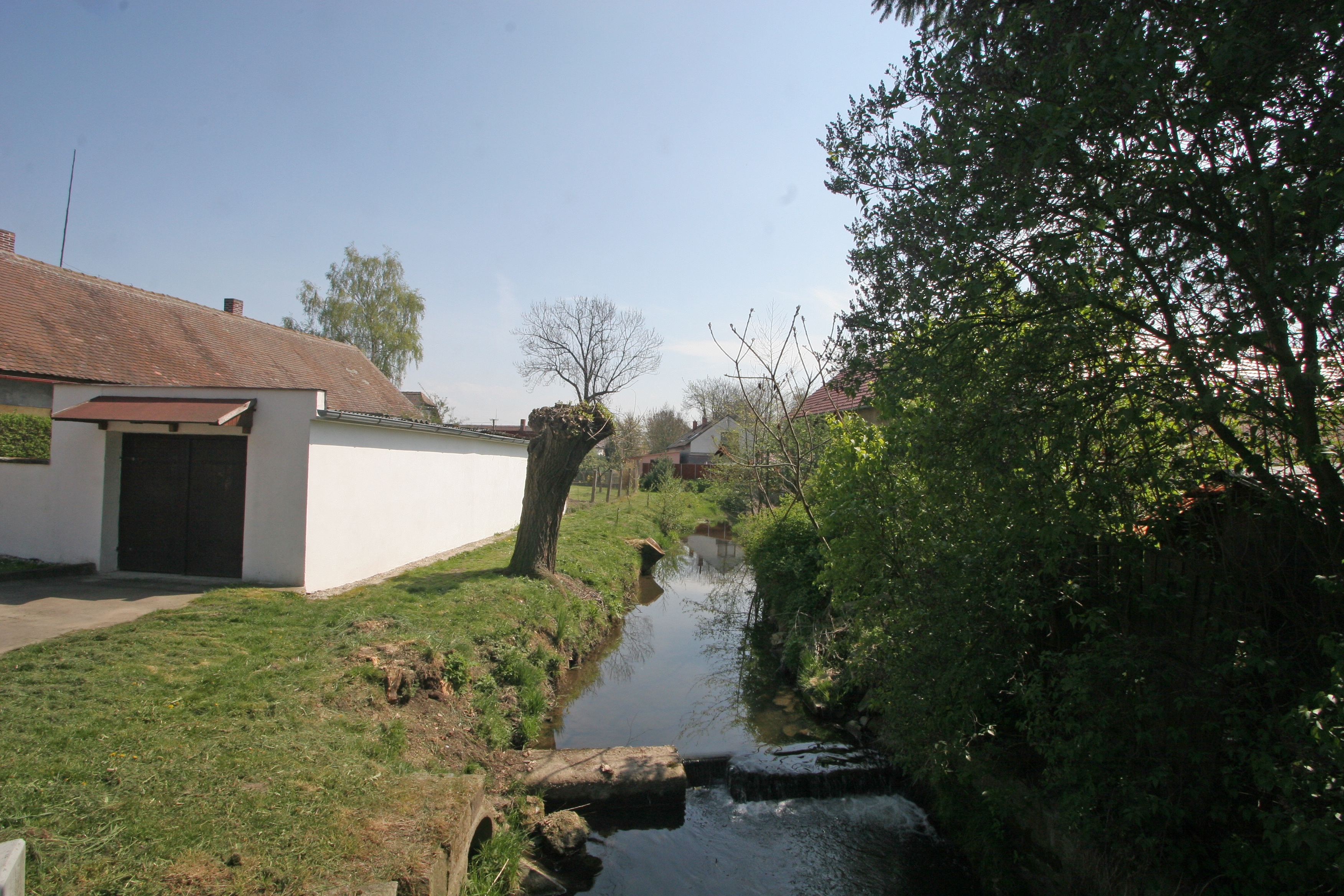 Bylany Bylanka